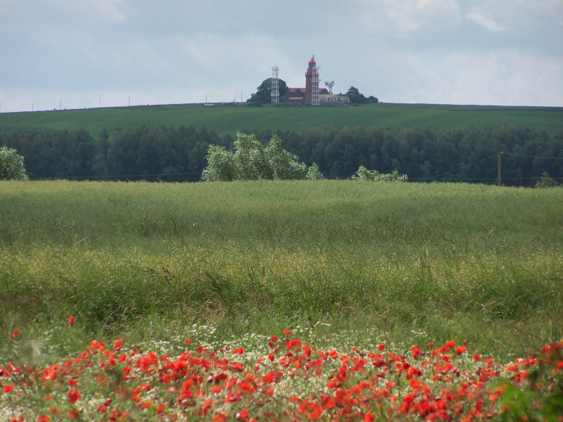 Blick von der Küste zum Leuchtturm Bastorf